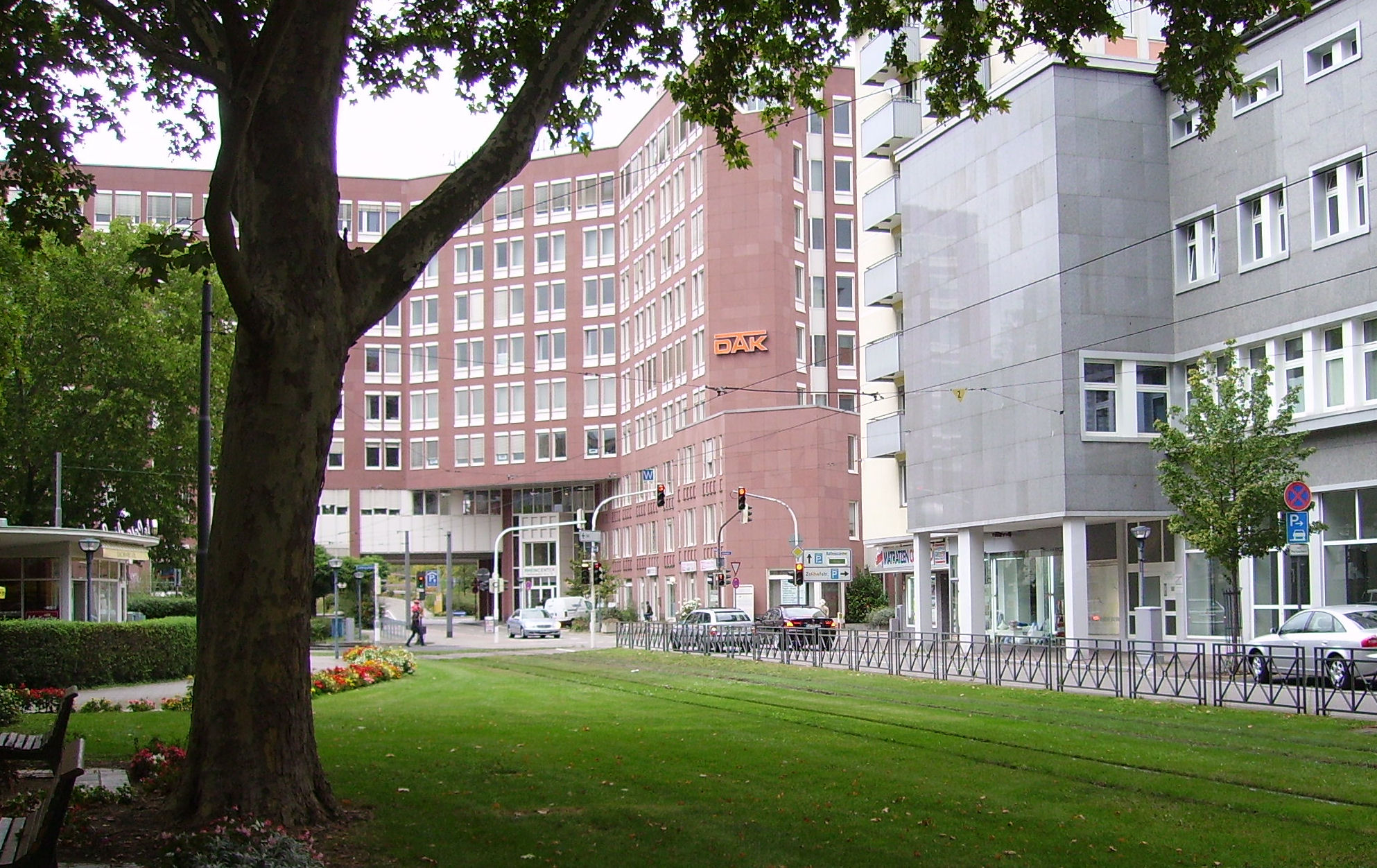 Ludwigsplatz in Ludwigshafen, Germany